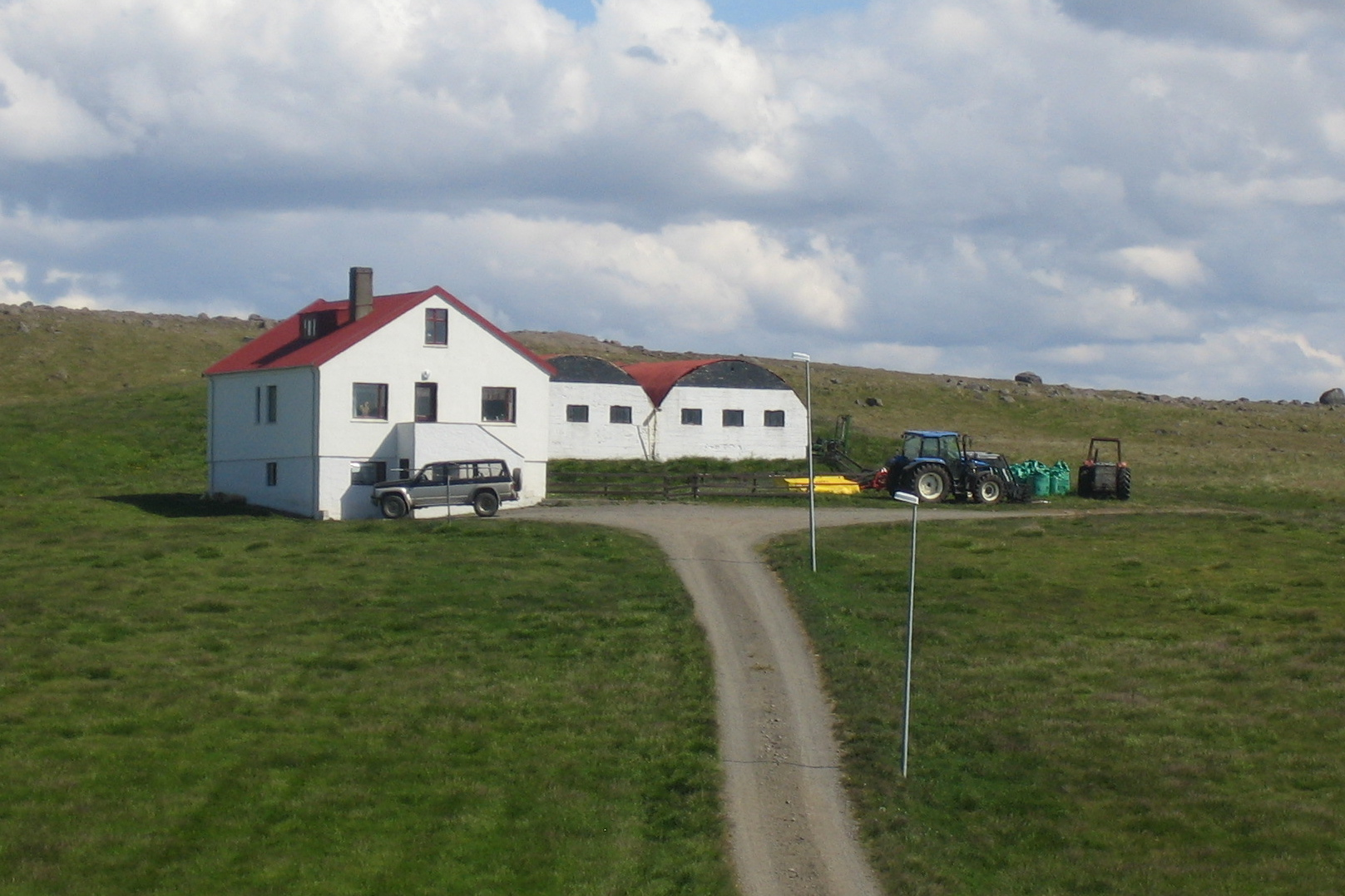 Bjarg í Miðfirði